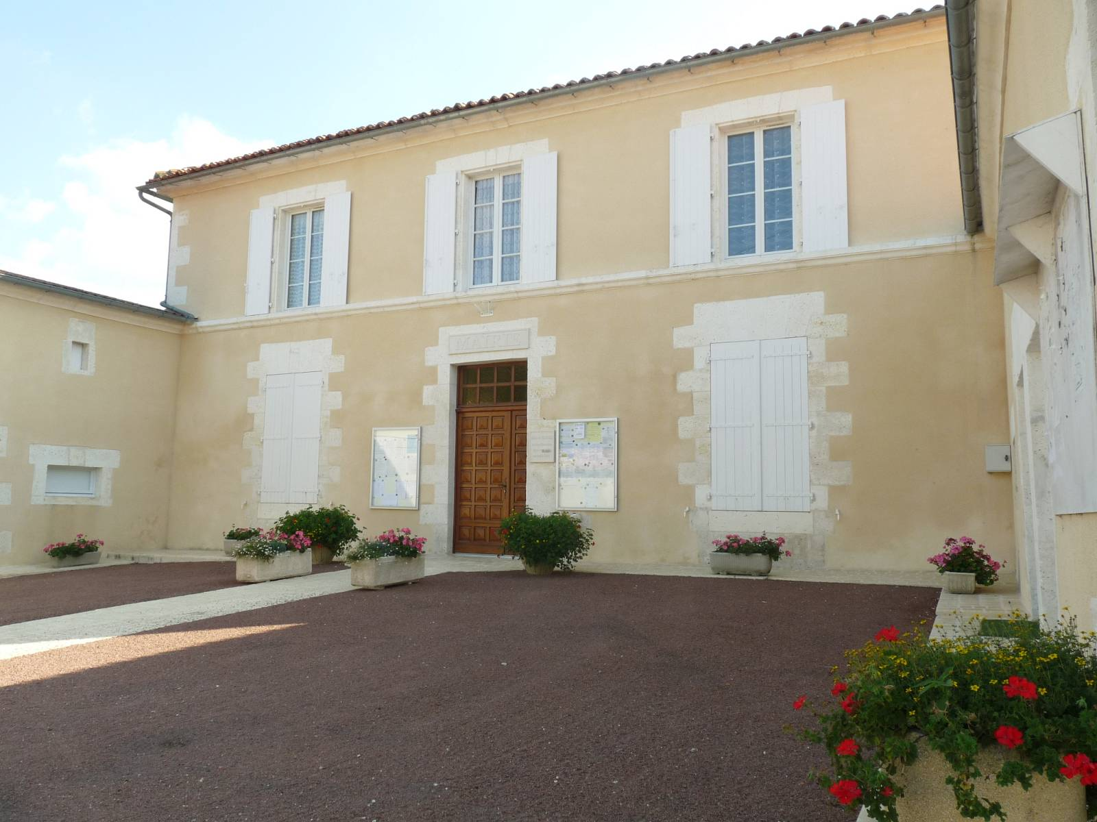 mairie de Vignolles (16), France